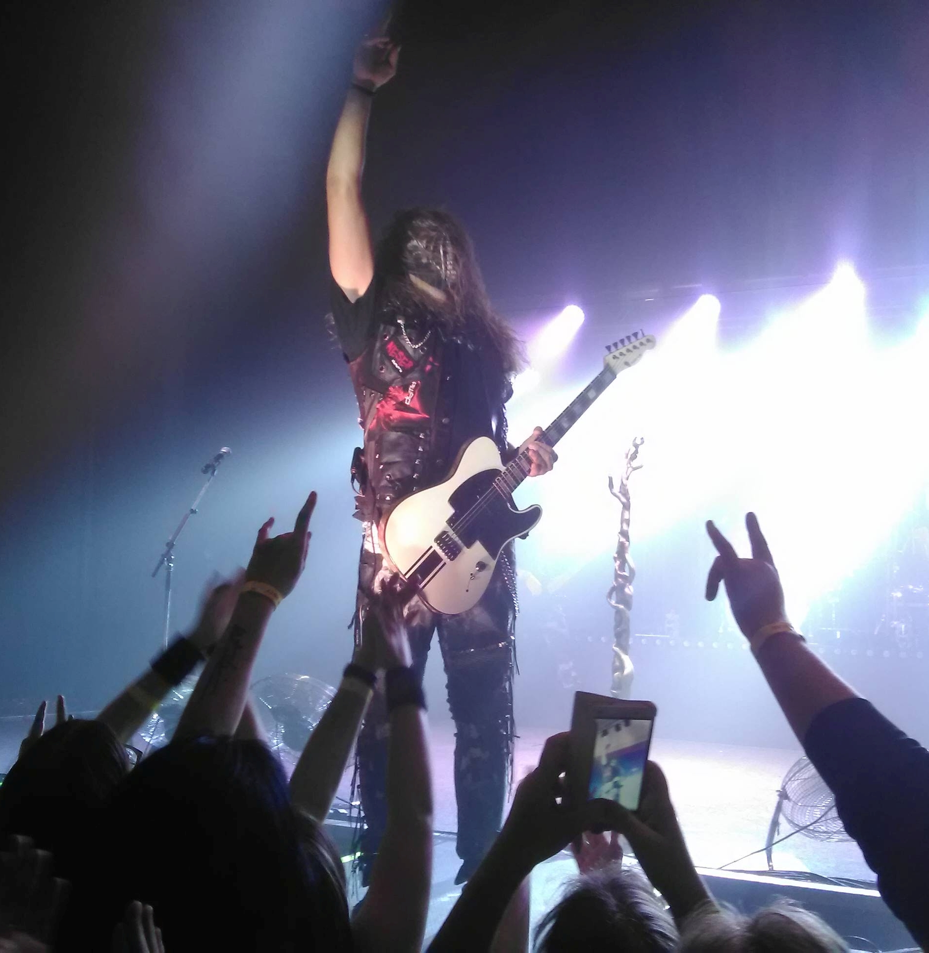 Jiří "Dymo" Urban s kapelou Dymytry v Zábřehu během Svijany Tour 2017